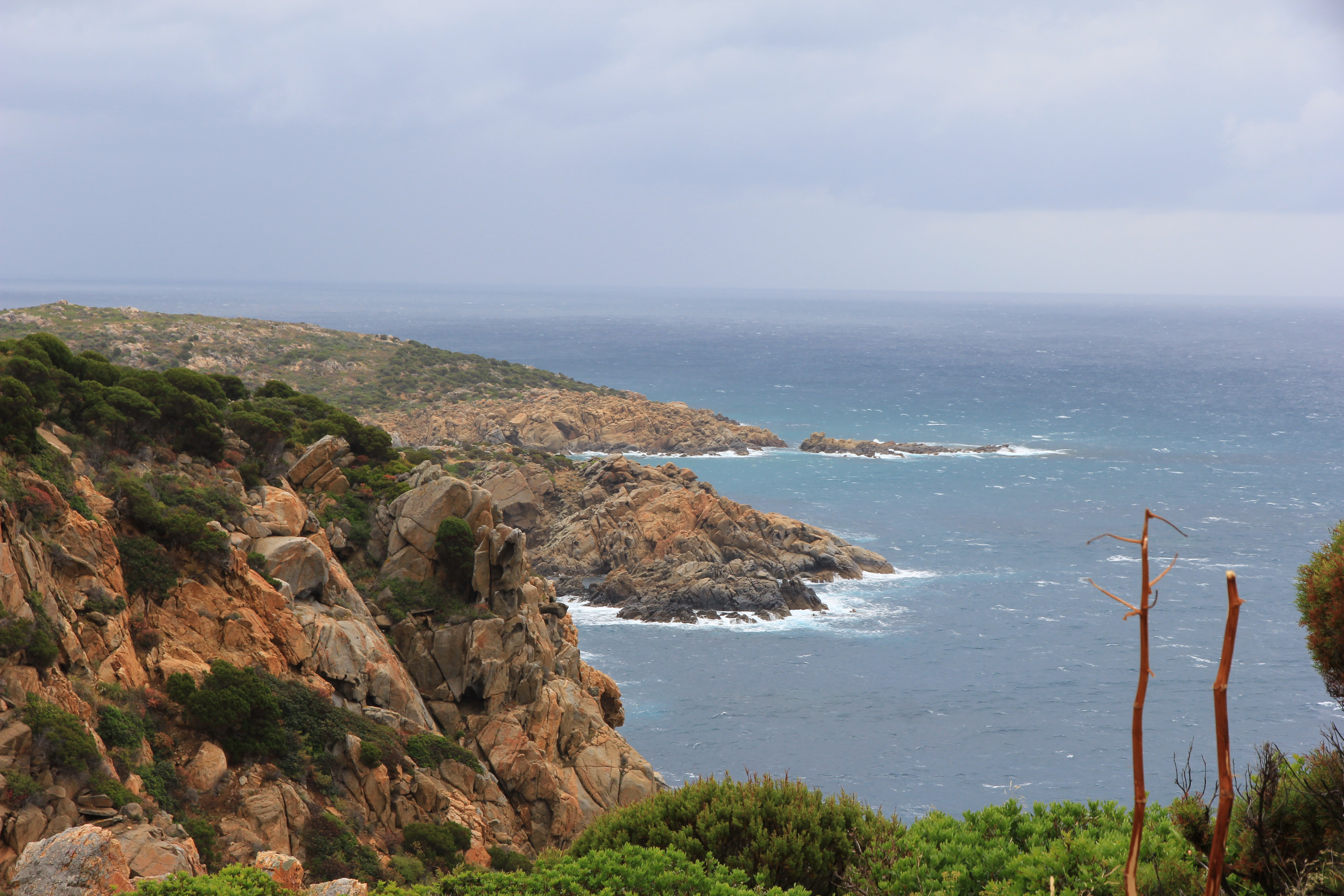 Domus de Maria, capo Spartivento